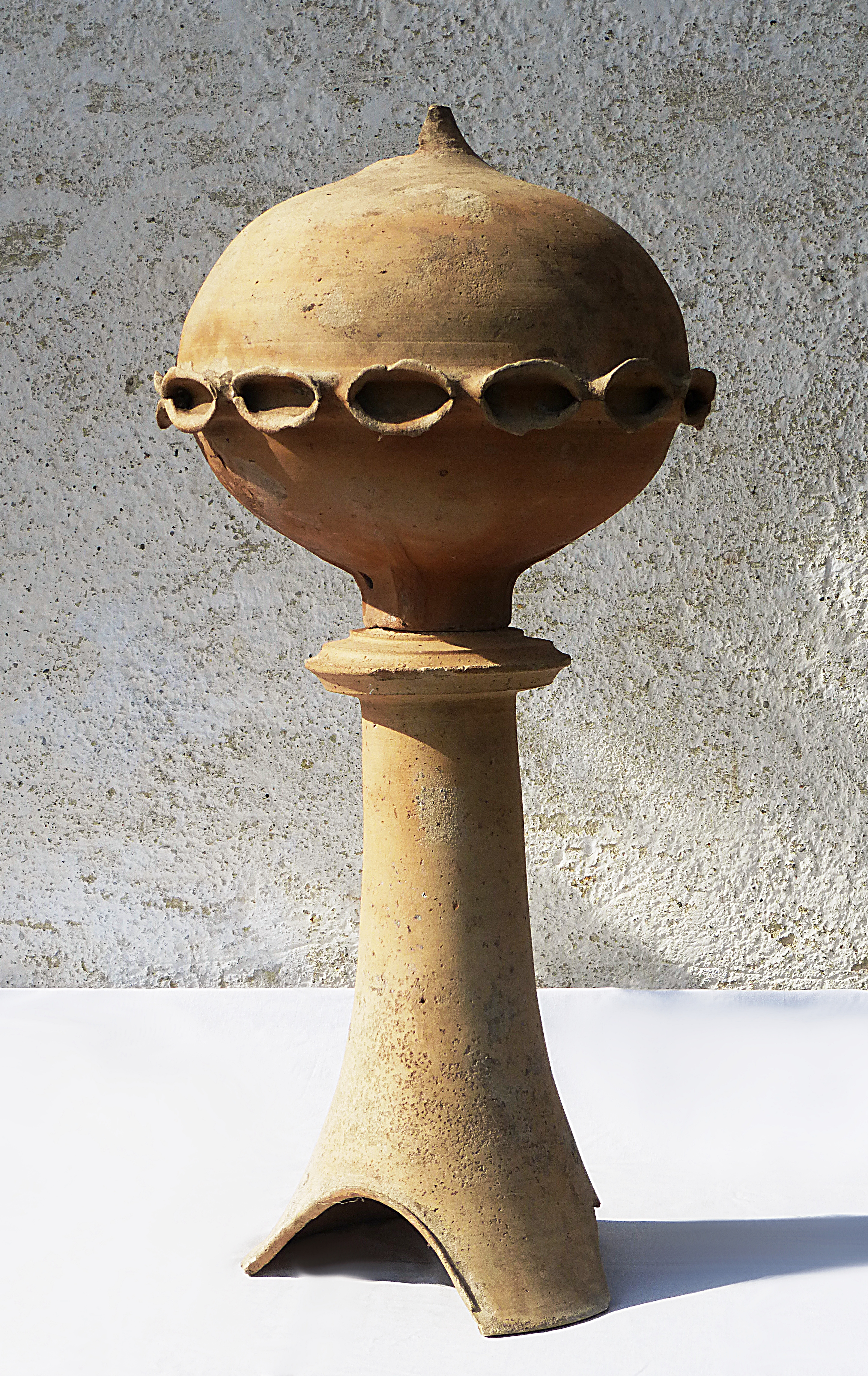 Zusammengesteckter Turmaufsatz aus Niederbayern / Rottal